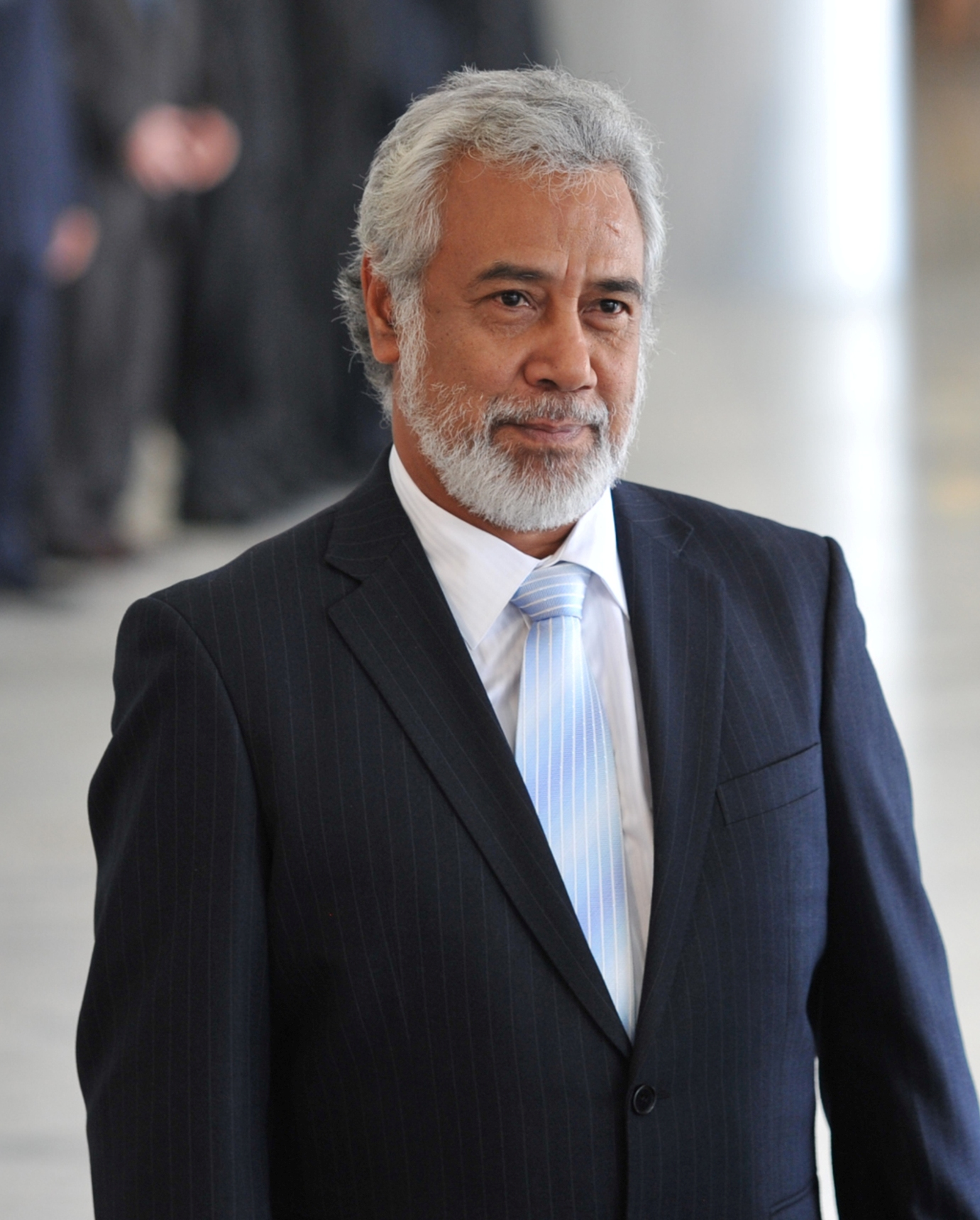 Xanana Gusmão, em visita ao Brasil, recebido pela presidenta Dilma Rousseff